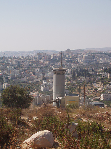 Blick von Gilo auf Beit Jalla. Teil der israelischen Sicherheitsanlage